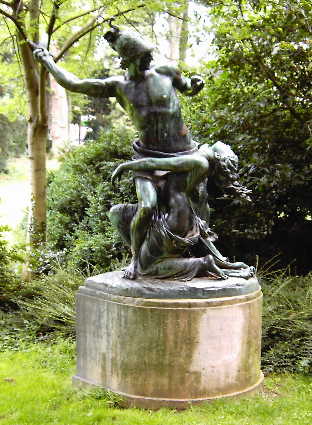 Joseph Uphues: Verteidigung einer Sabinerin (1886), Skulptur im Stadtpark Düren